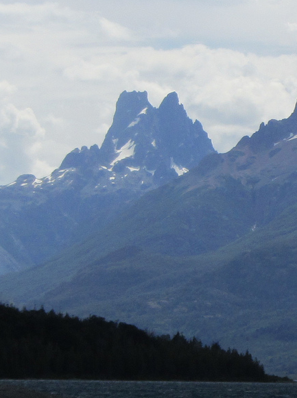 Cerro Dos Picos desde el Lago Cholila